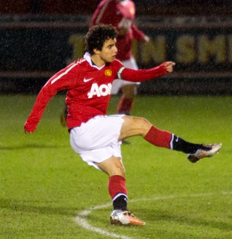 Fábio Pereira da Silva taken at a reserve game in Rochdale